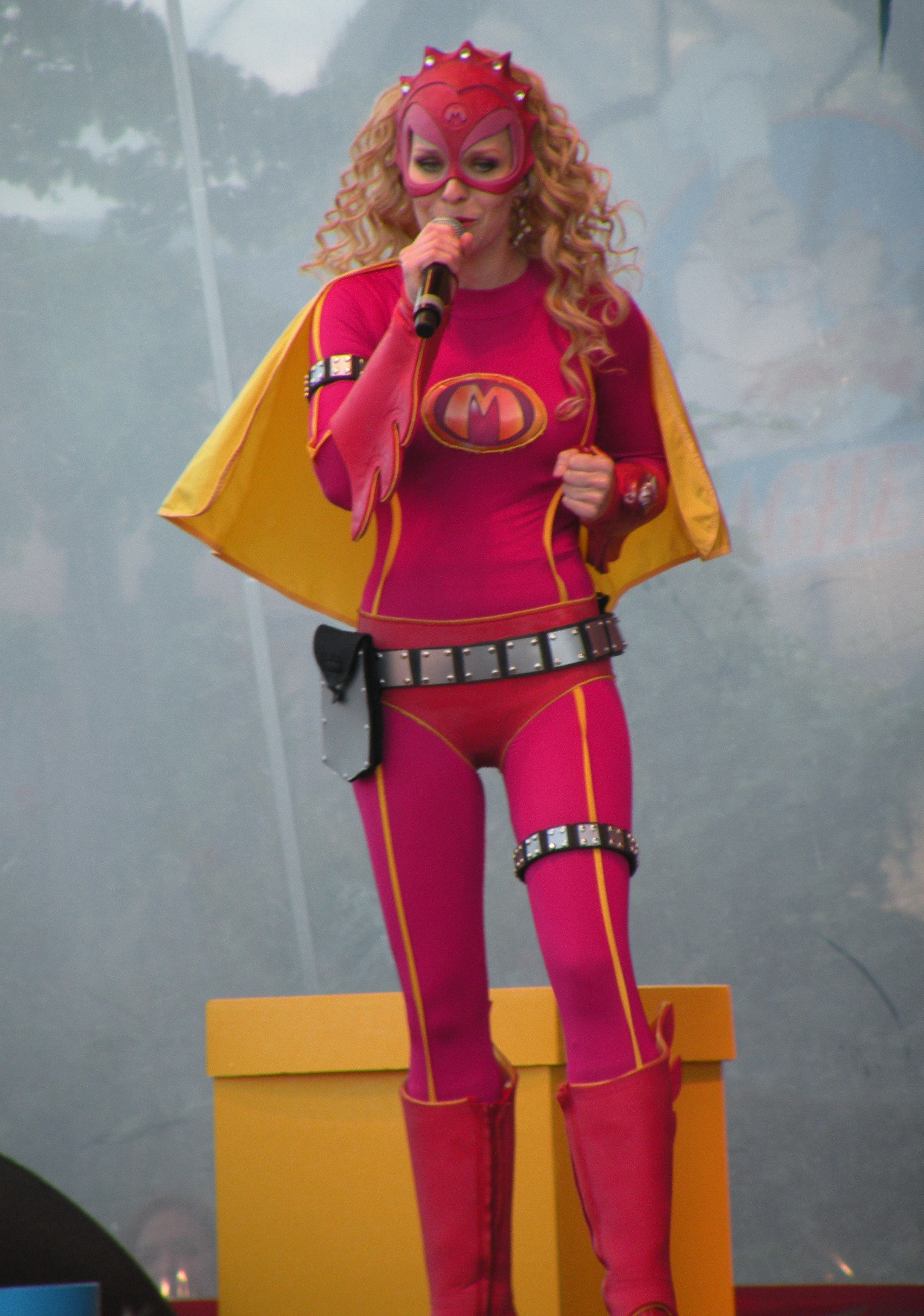 Free Souffriau als Mega Mindy tijdens een optreden op het dorpsplein van Plopsaland De Panne in België